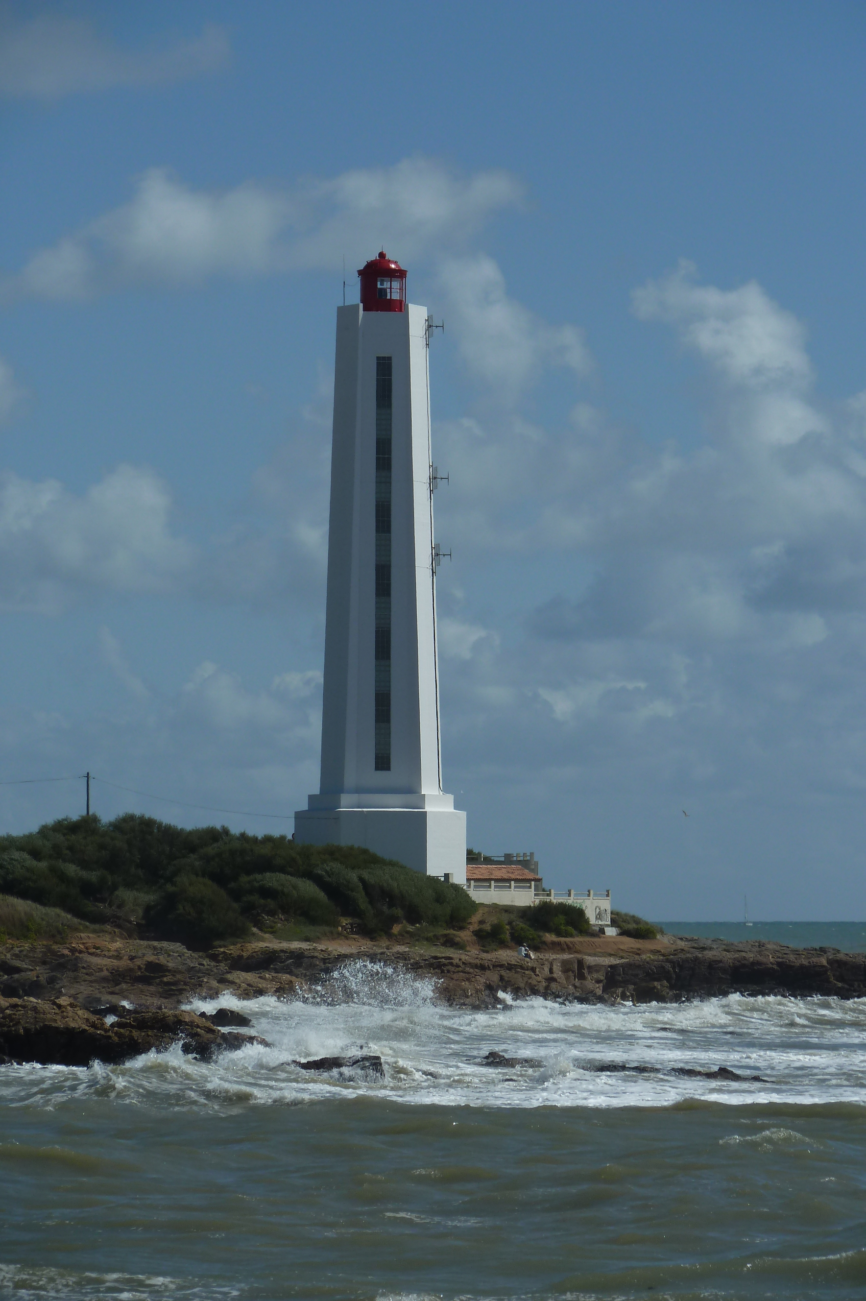 Phare de l'Armandèche aux Sables d'Olonne